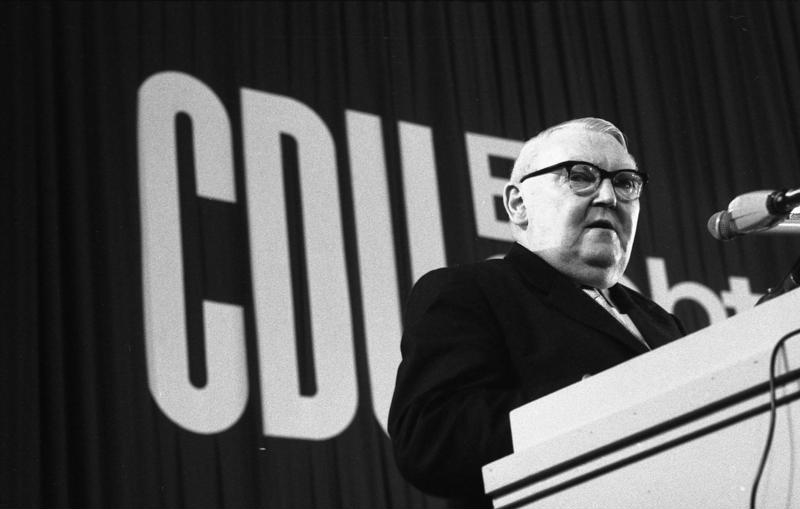 CDU - Bundesparteitag in Düsseldorf